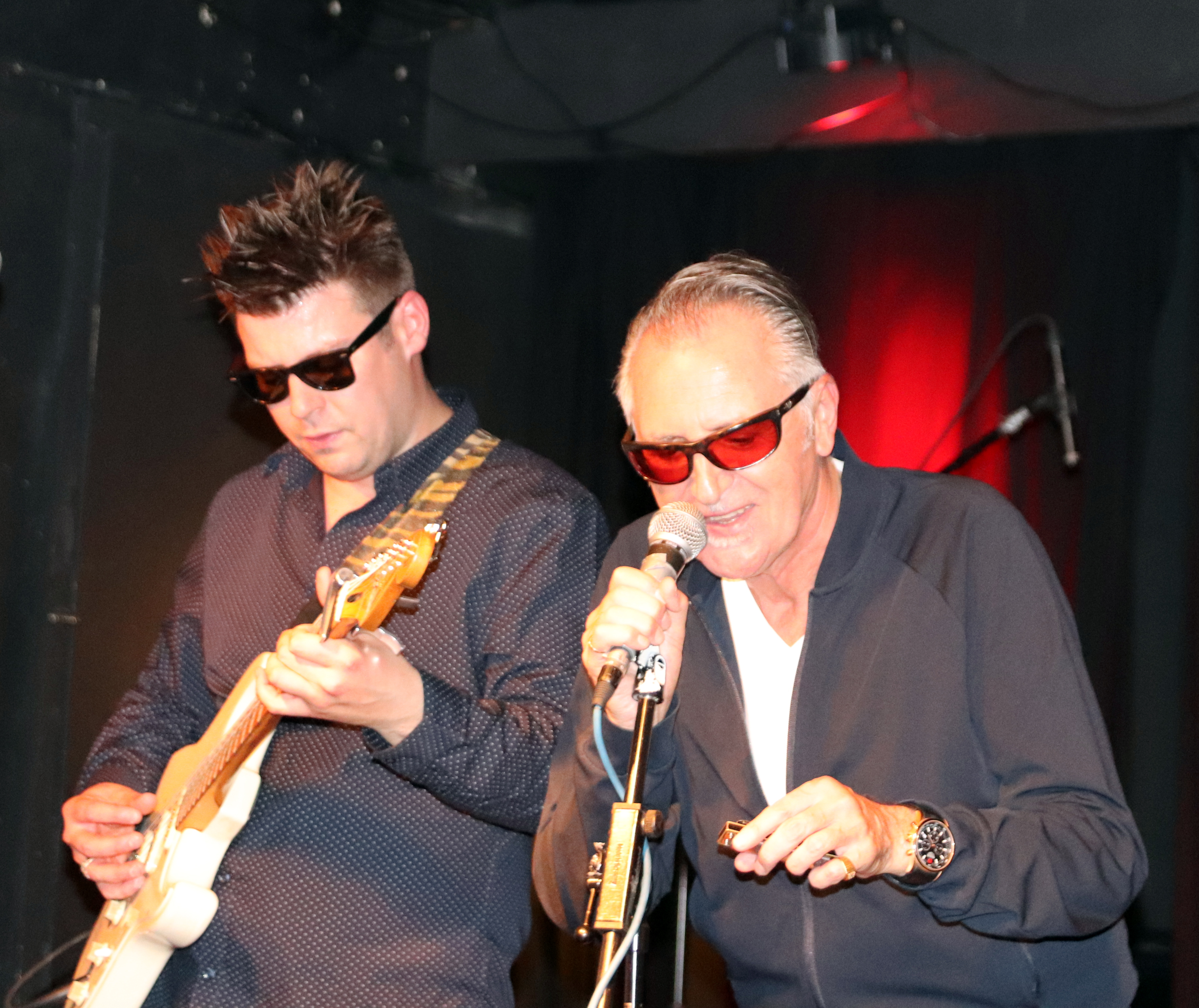 Ryan und Pual Lamb beim "Theresa May Brexit Blues" in der Kofferfabrik Fürth